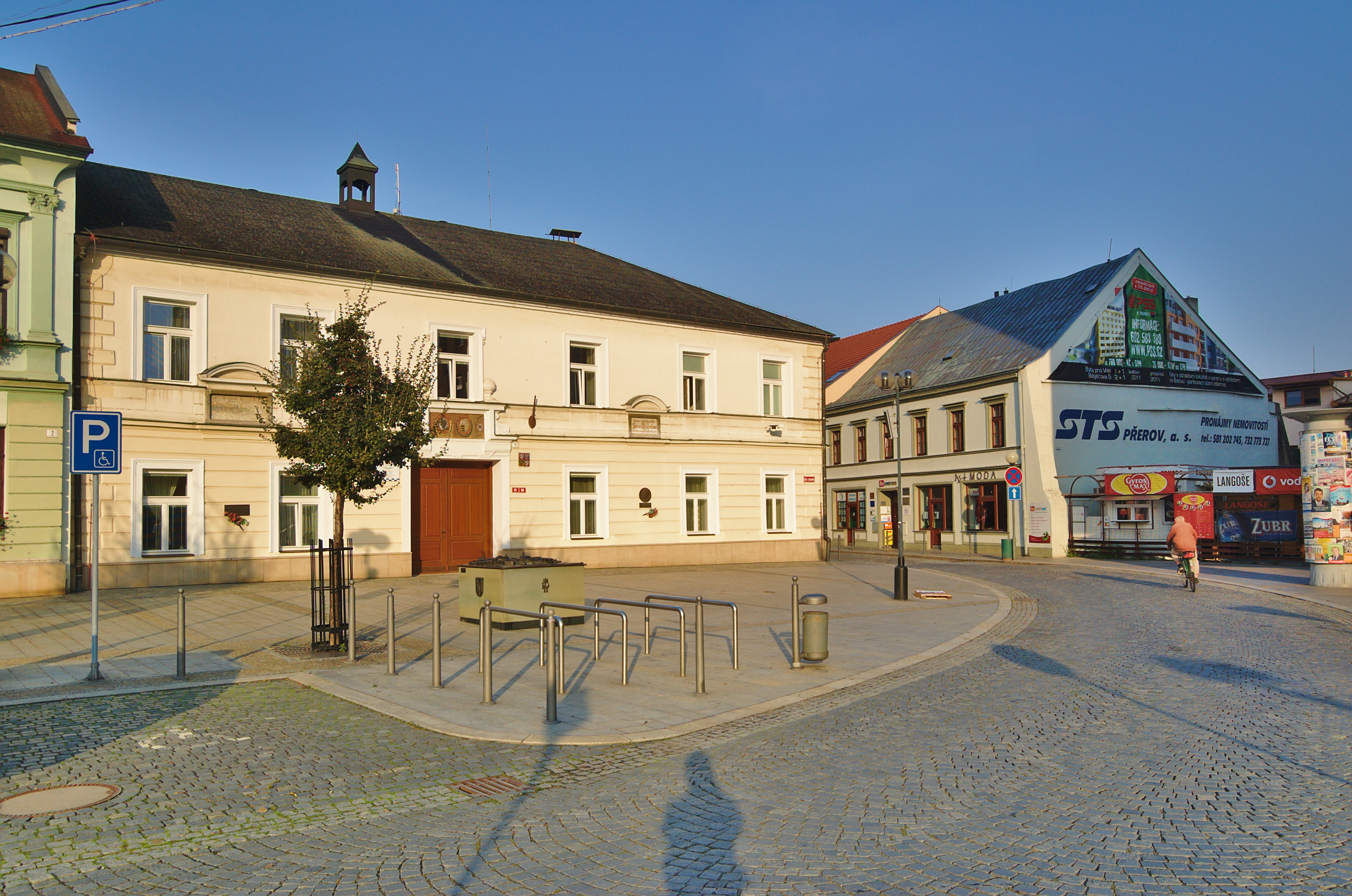 Sídlo městské policie, čp. 80, náměstí T.G.Masaryka, Přerov